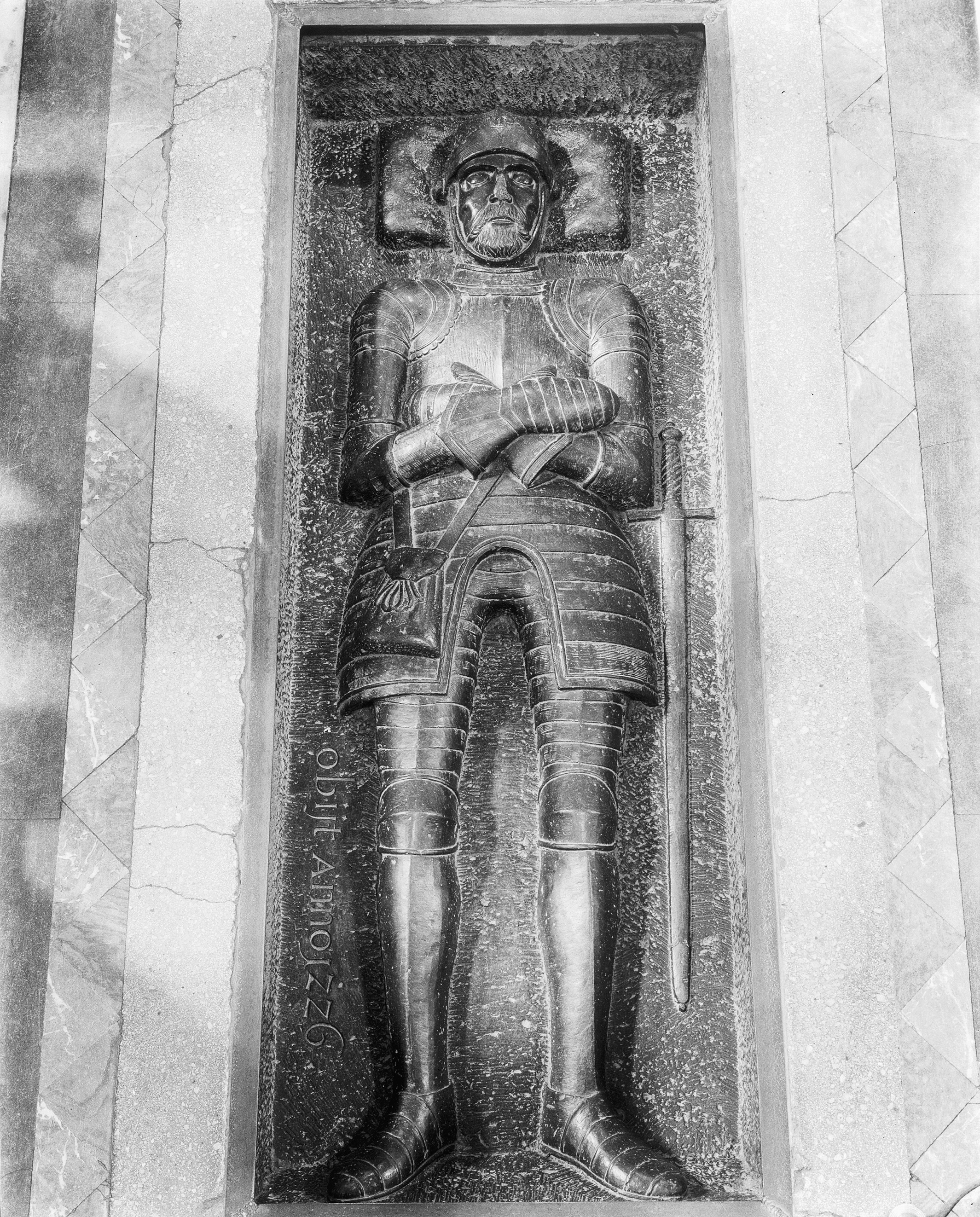 Abdij Kerk: grafzerk van Walram III hertog van Limburg